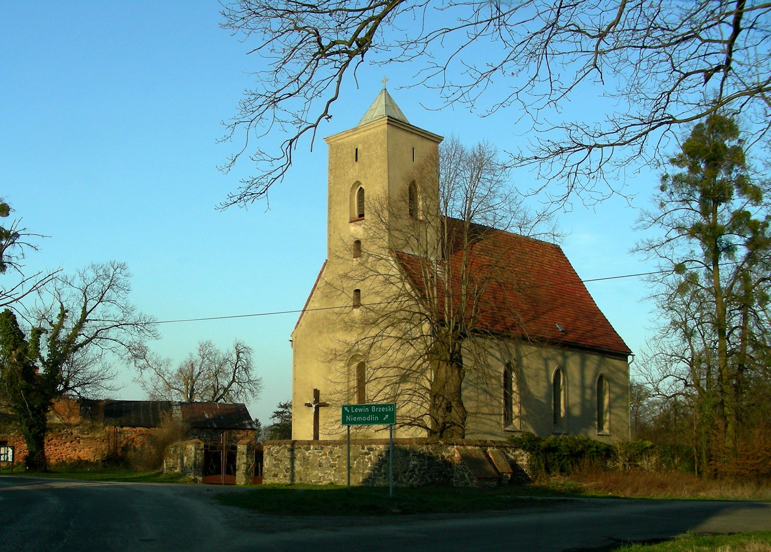 Kościół pw. NMP, Szydłowiec Śląski, gmina Niemodlin, powiat opolski, województwo opolskie